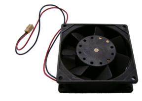 Ventilátor.